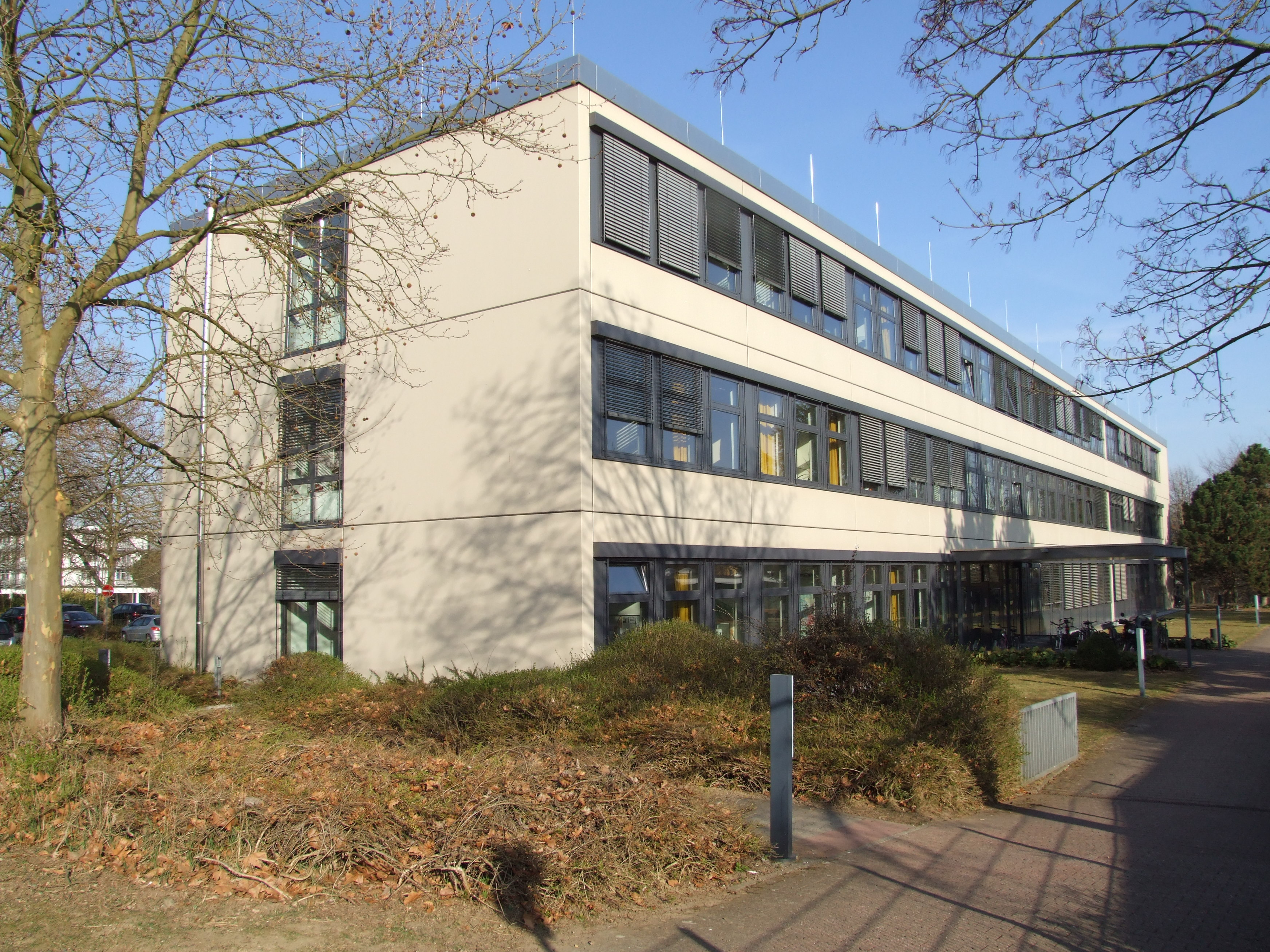 Forschungsgebäude mit Lehrstühlen der Deutschen Universität für Verwaltungswissenschaften Speyer von Südosten an der Otto-Mayer-Str. in Speyer; nördliches Drittel des Gebäudes: Sitz des Deutschen Forschungsinstituts für öffentliche Verwaltung Speyer